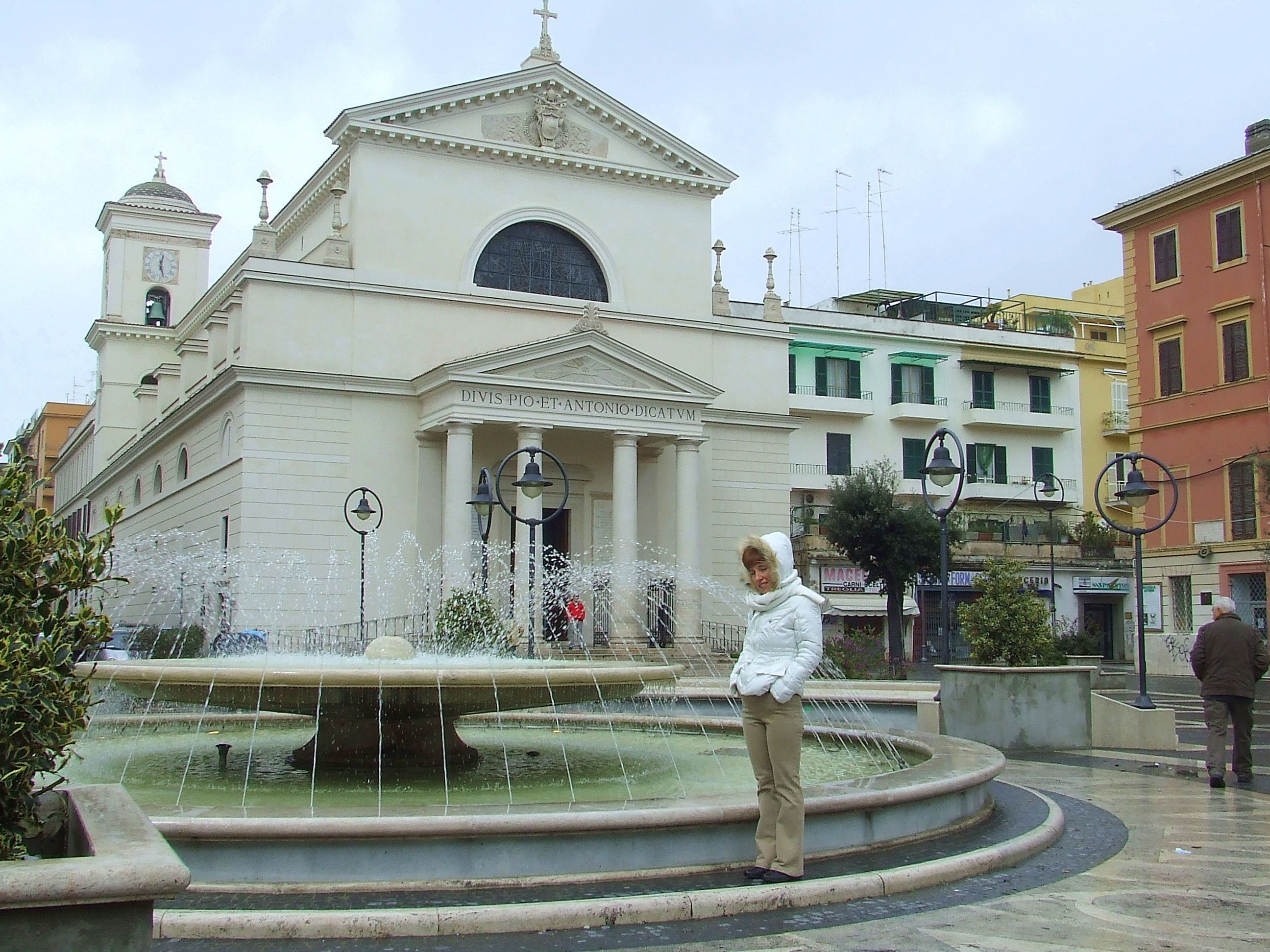 Chiesa dei SS. Pio e Antonio in piazza Pio ad Anzio